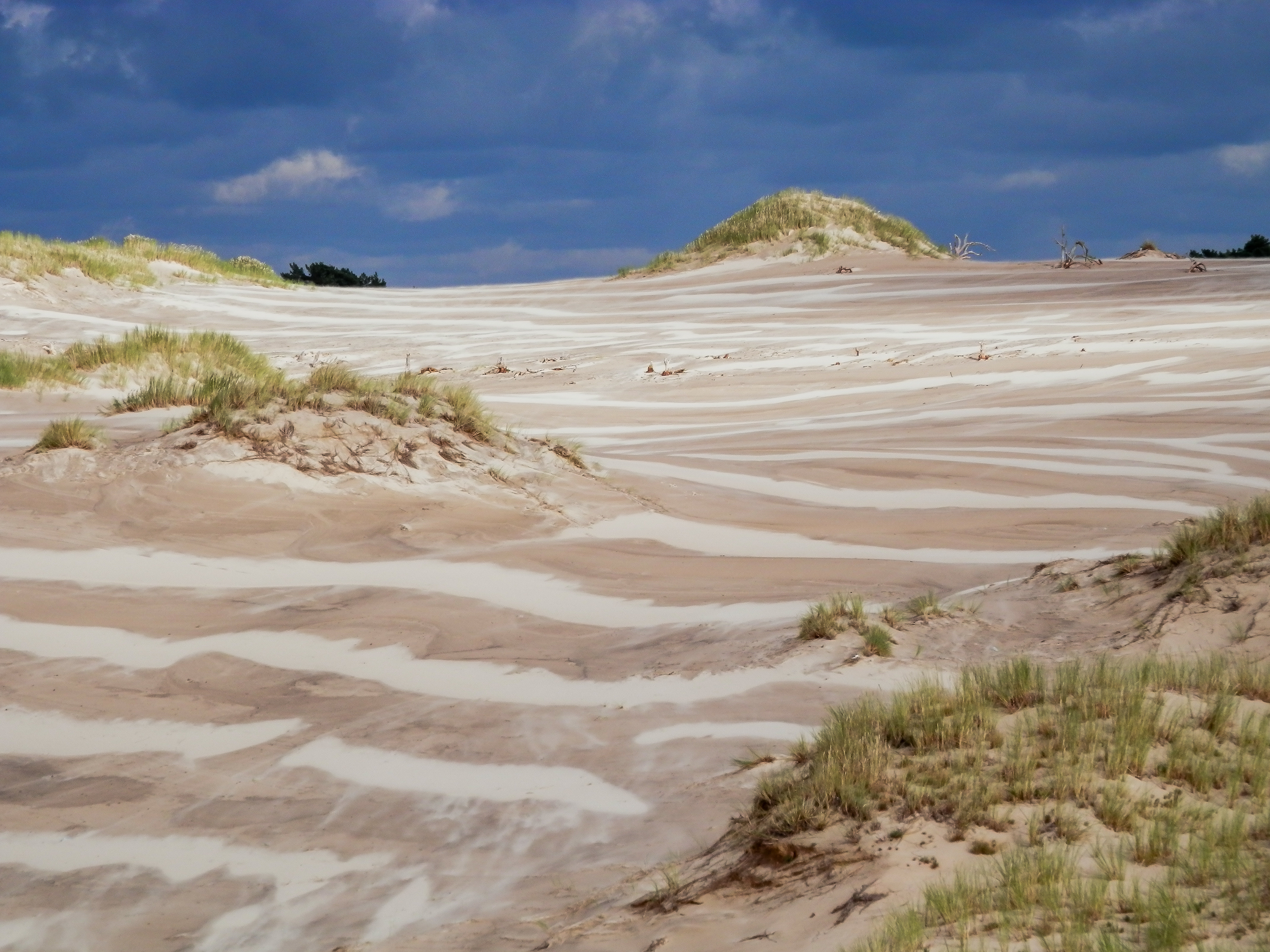 Specjalny obszar ochrony siedlisk Ostoja Słowińska. This is a photography of Natura 2000 protected area with ID PLH220023